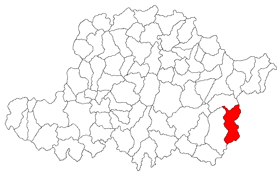 Categorie:Hărţi ale judeţului Arad